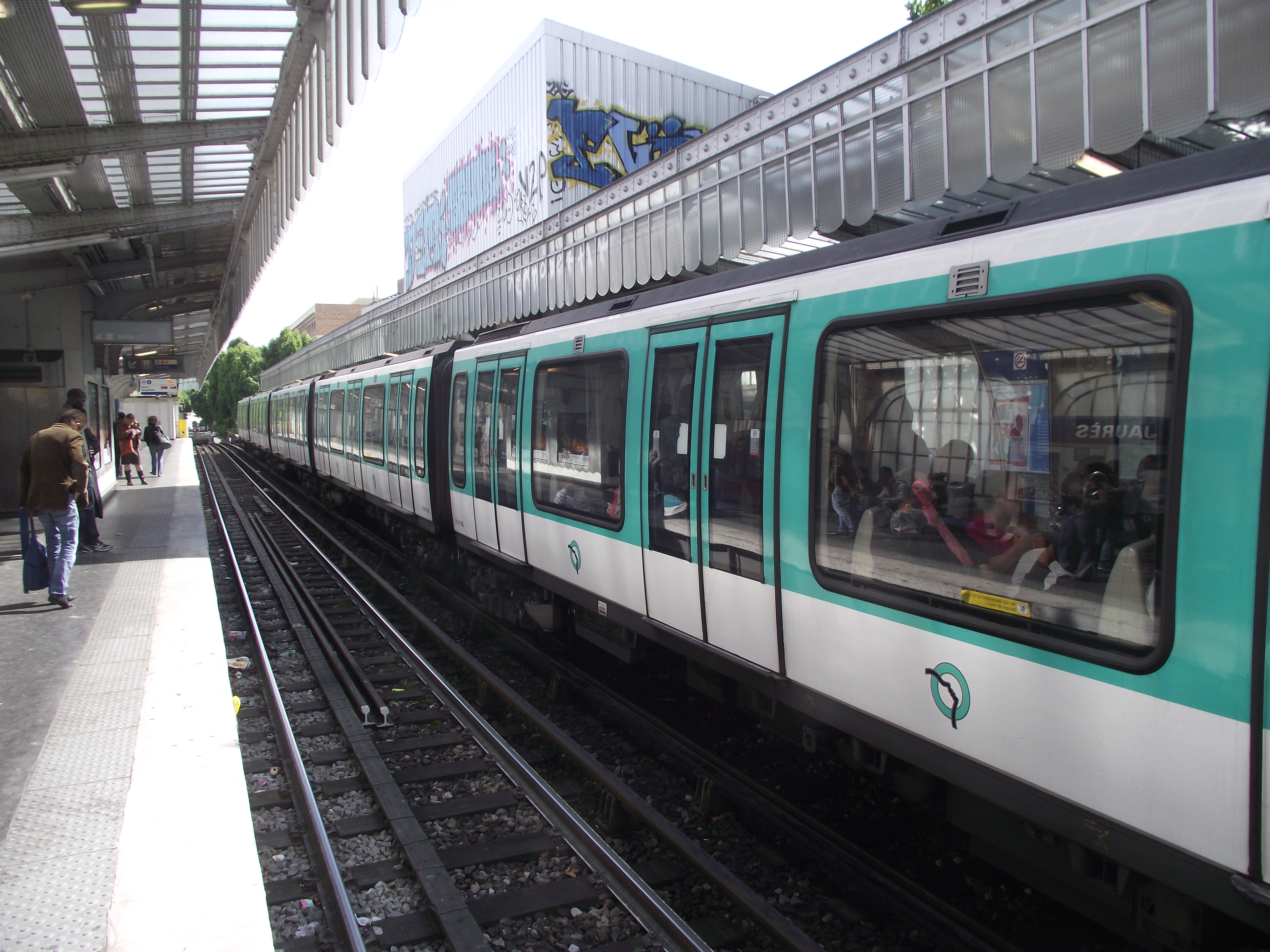 MF 2000 metrotrein in station Jaurès